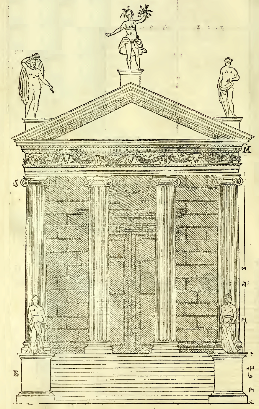 Immagine del Tempio della fortuna virile dal quarto libro dell'architettura di Andrea Palladio